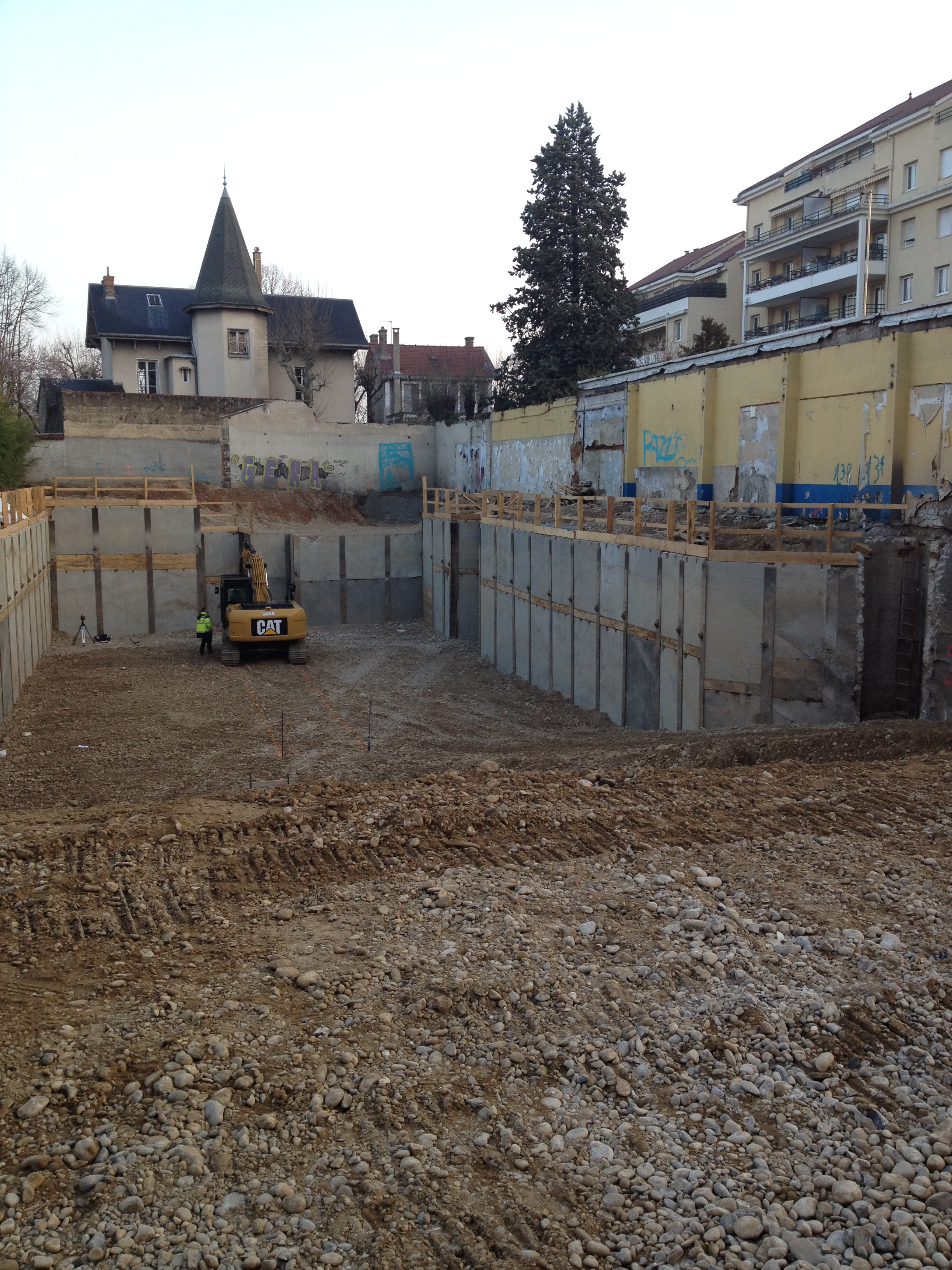 Paroi berlinoise. Soutènement provisoire réalisé par fonçage de profils métalliques et insertion entre fers de panneaux préfabriqués béton. Villeurbanne, mars 2014.